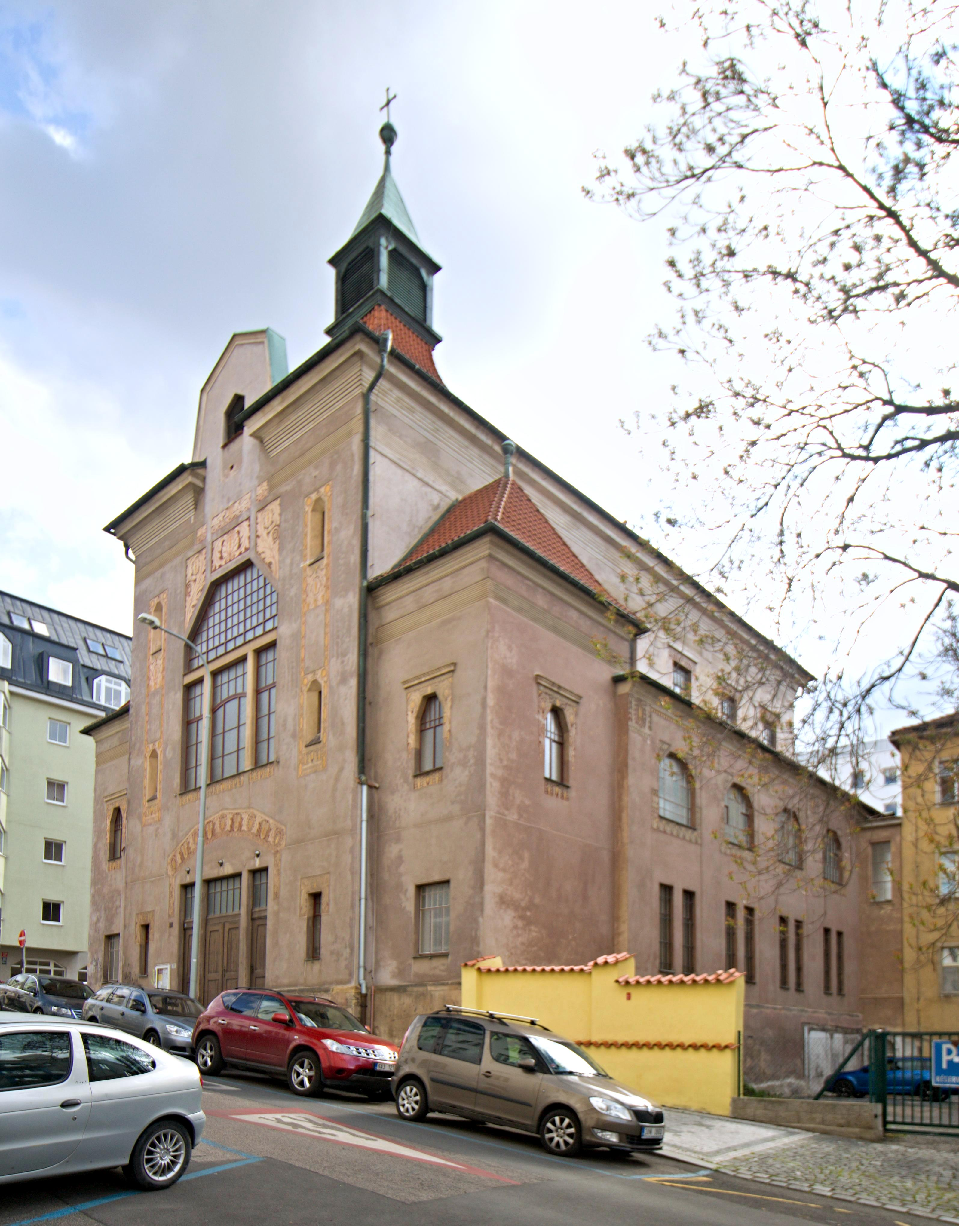 Žižkov kostel sv. Anny